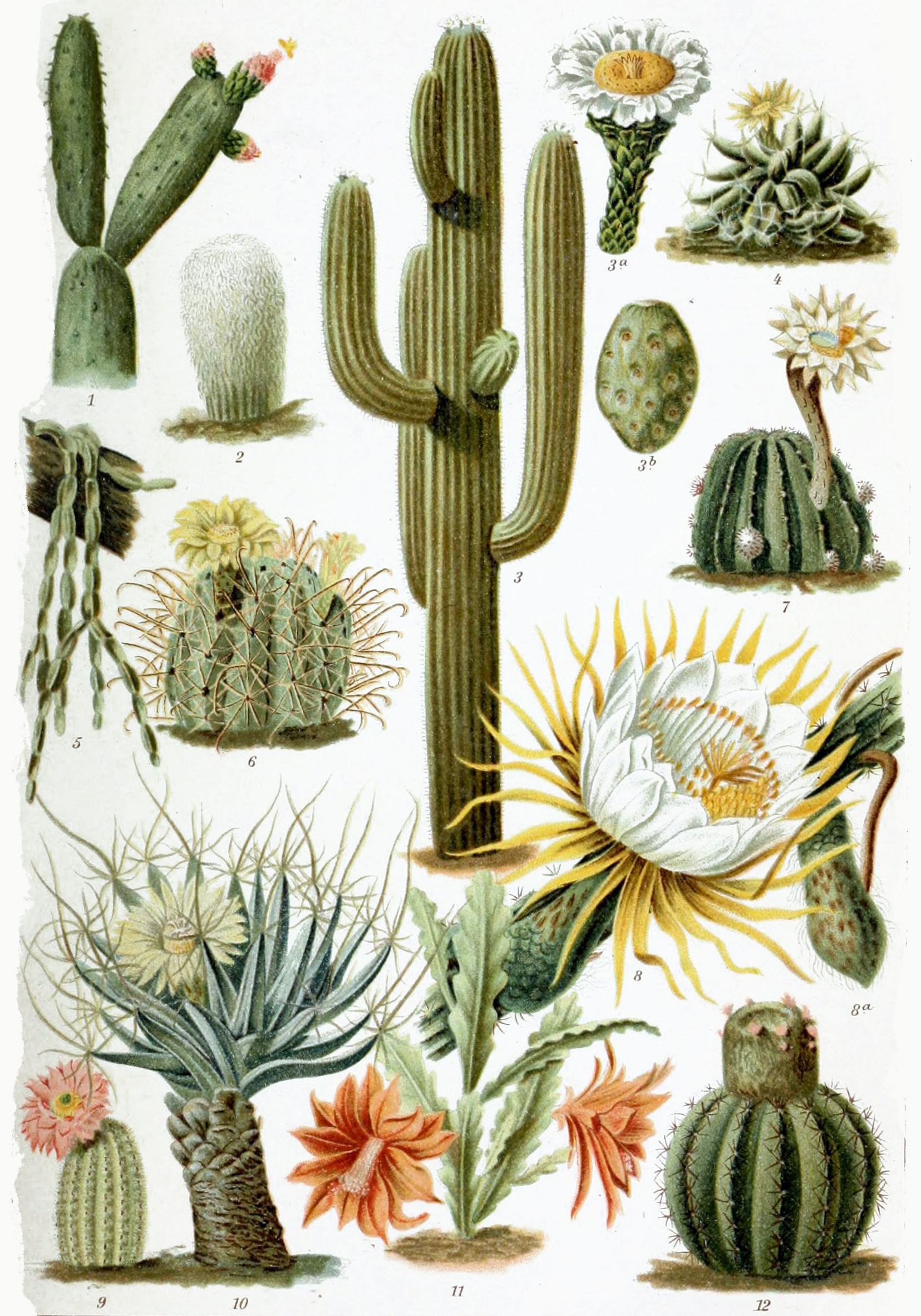 Various Cactaceae 1-Nopalea coccinellifera 2-Cephalocereus senilis 3-Cereus giganteus 4-Mammillaria longimamma 5-Rhipsalis paradoxa 6-Echinocactus longihamatus 7-Echinopsis oxygona 8-Cereus grandiflorus 9-Echinocereus pectinatus 10-Leuchtenbergia principis 11-Phyllocactus ackermanni 12-Melocactus communis